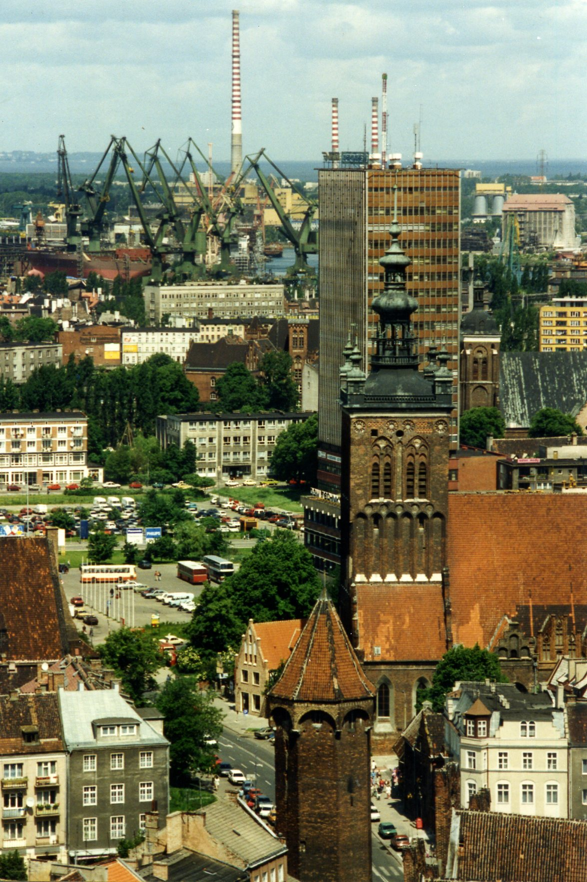 Gdańsk Stare Miasto.